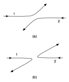 2 chemins possible d'un système de 2 particules identiques.